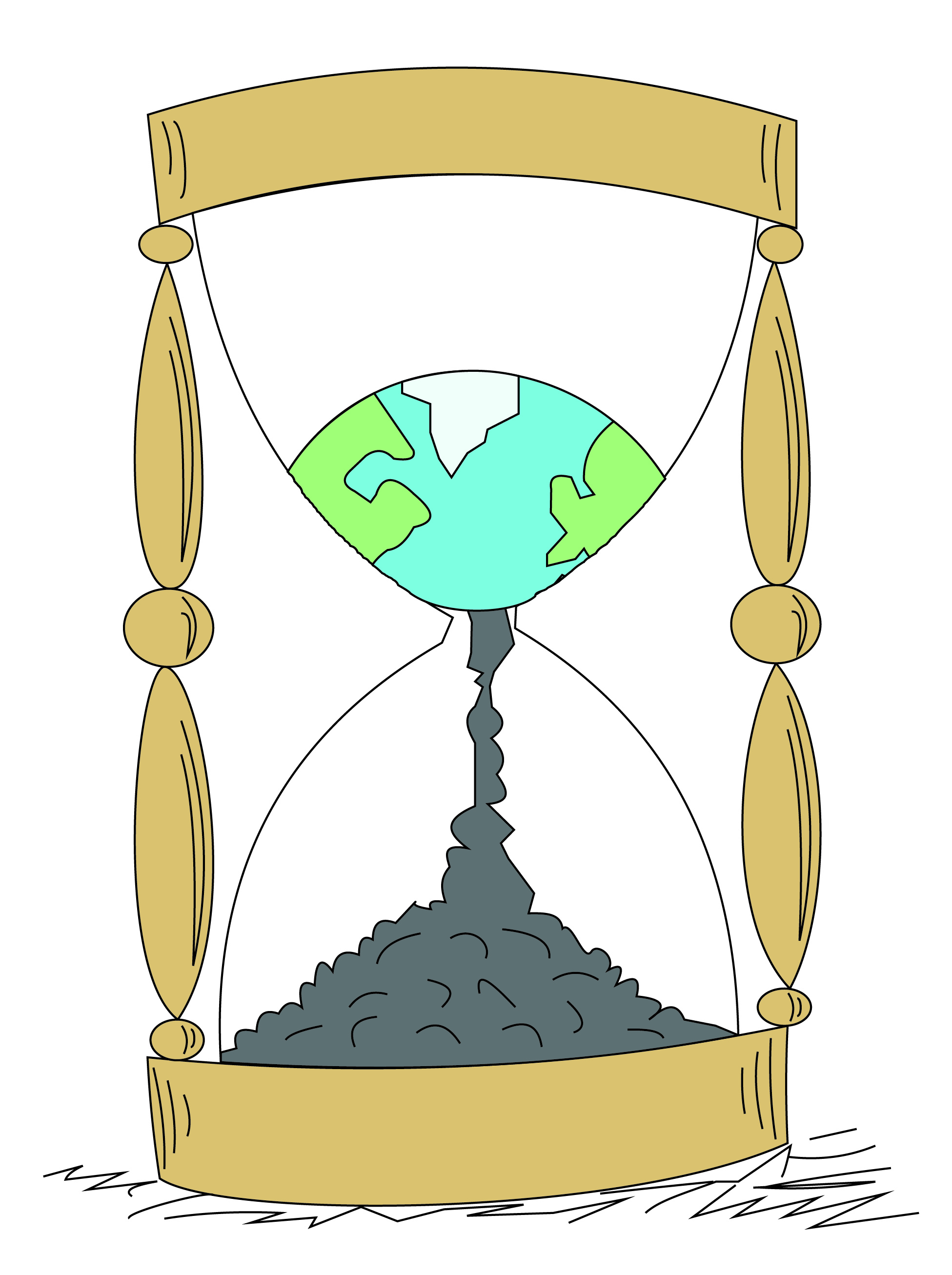 Hondar erlojua